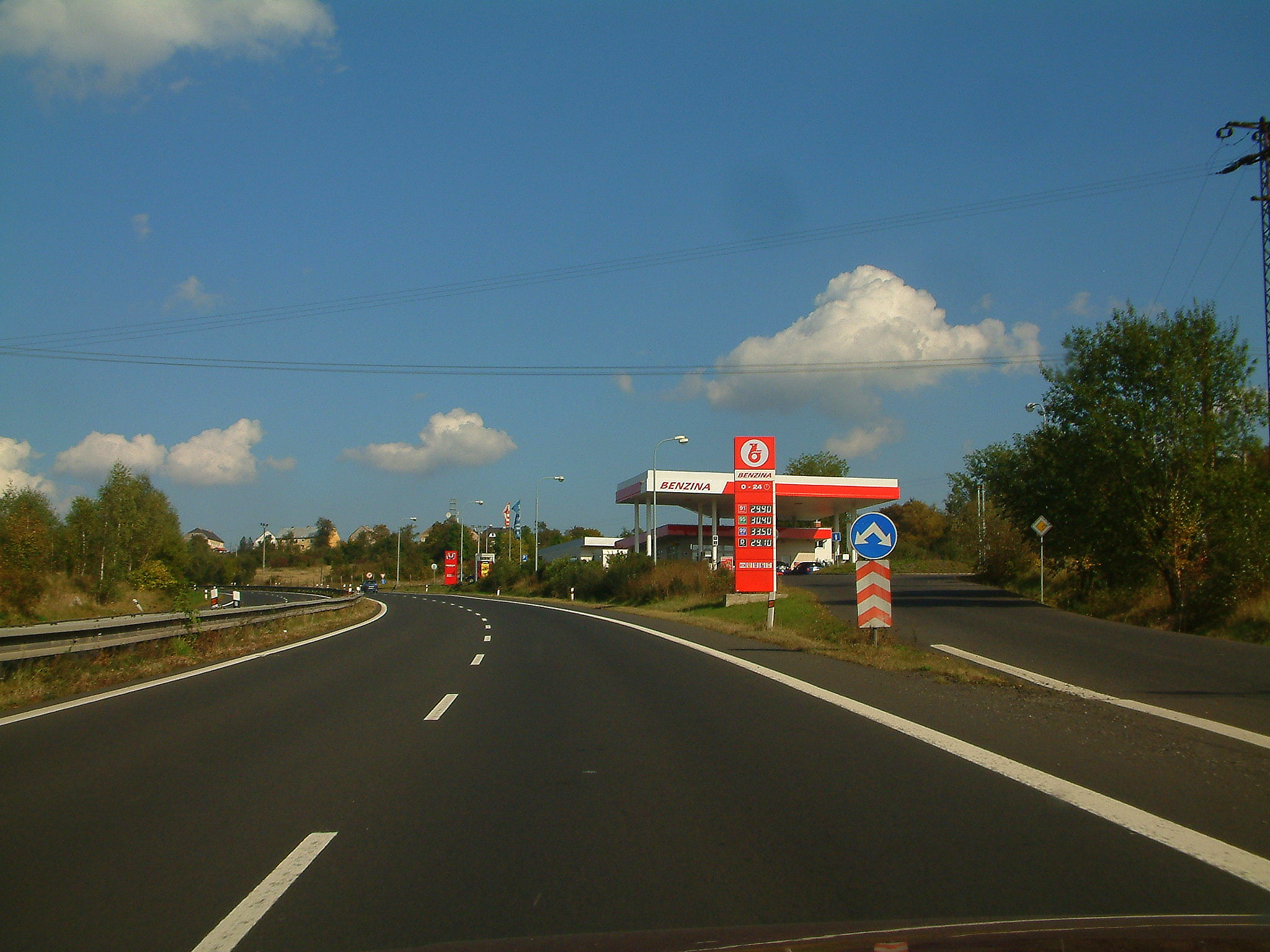 U Všeborovic (bei Schobrowitz) 23.09.2007